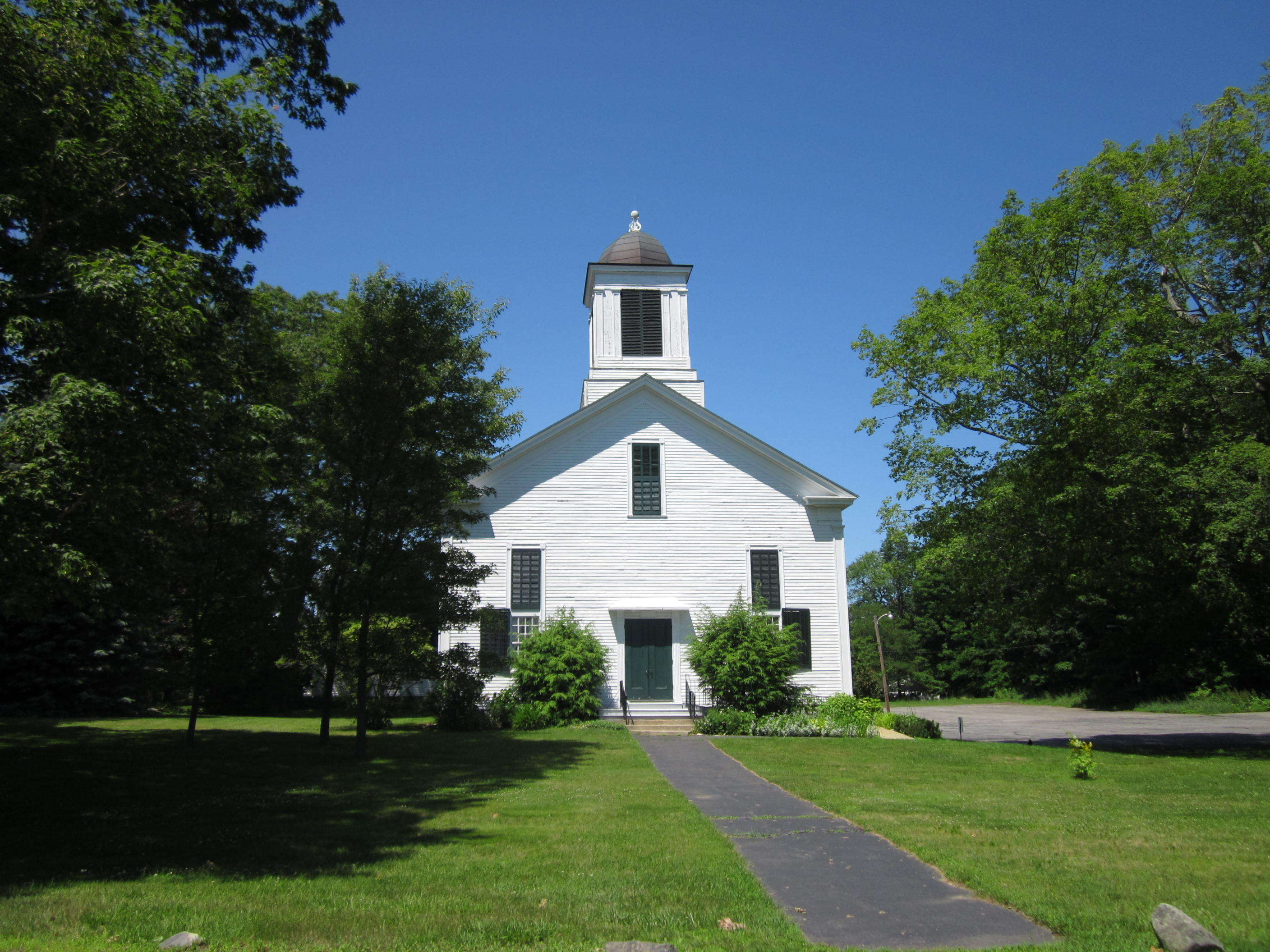 Kittery Point, Maine